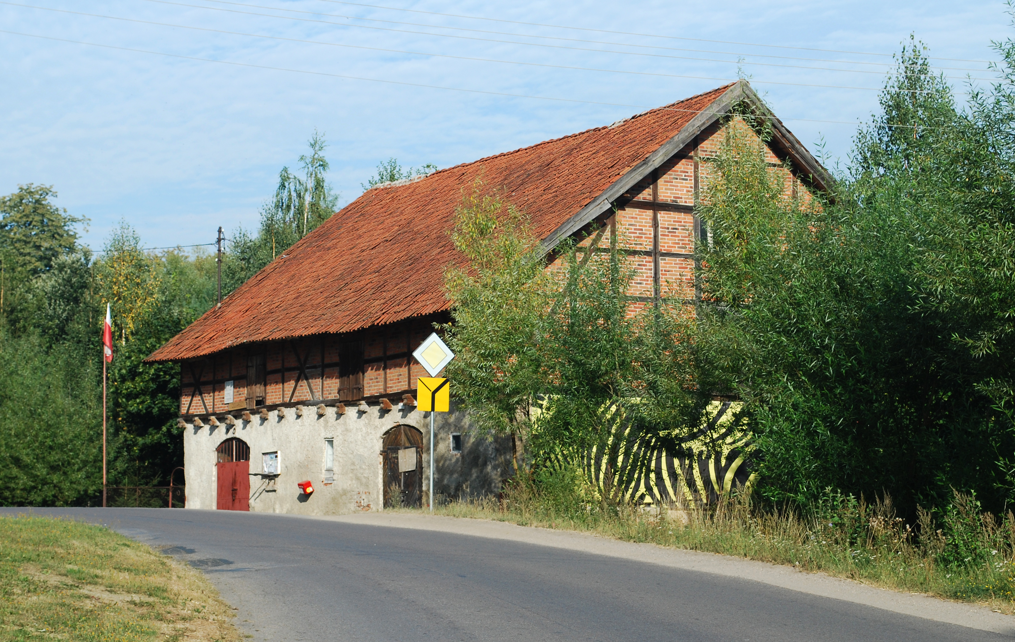 Sątopy - chałupa pod kościołem